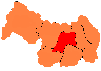 Podział powiatu legnickiego na gminy